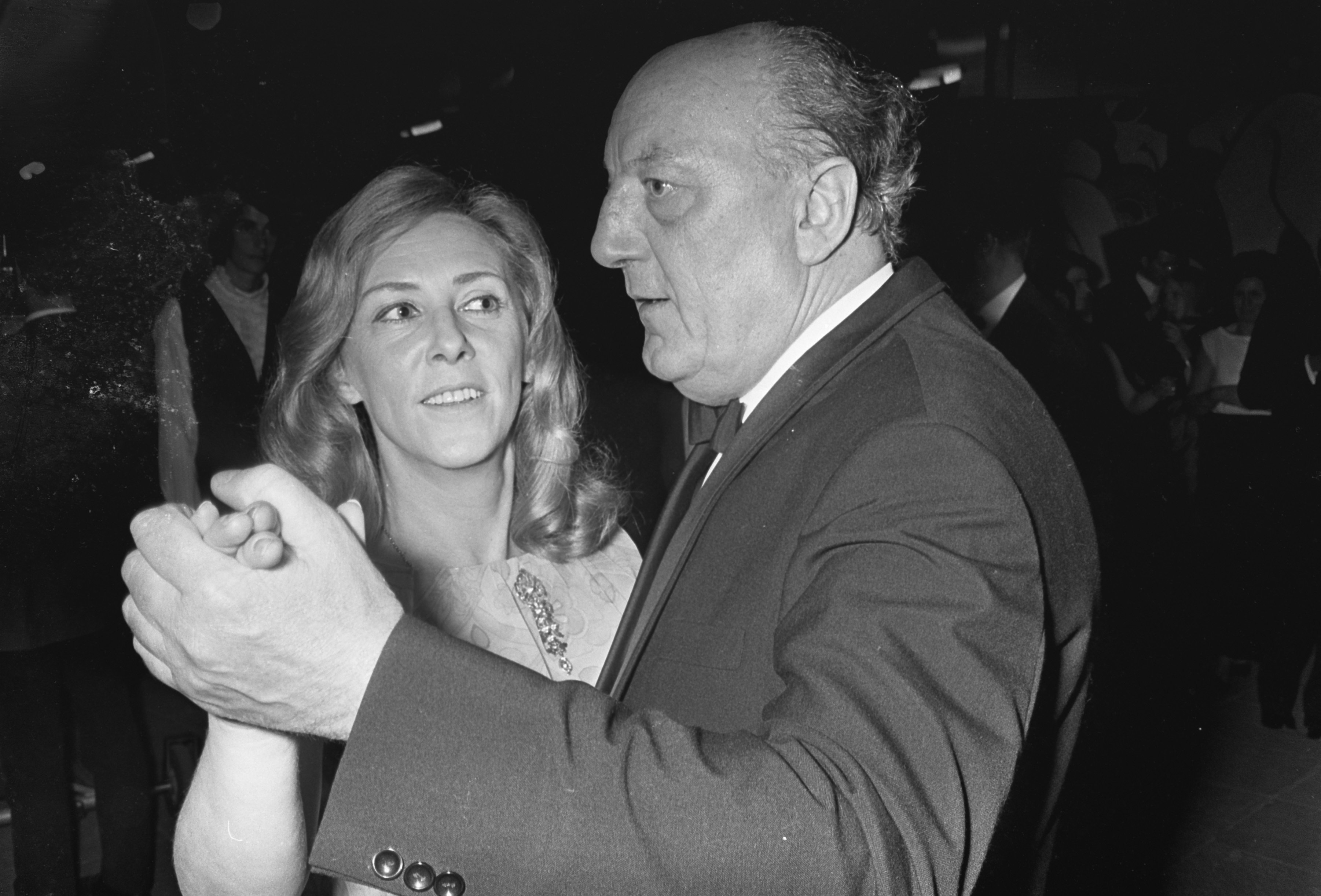 Boekenbal 68 in Stedelijk Museum. Schrijver Ed Hoornik with Mies Bouhuys op de dansvloer.